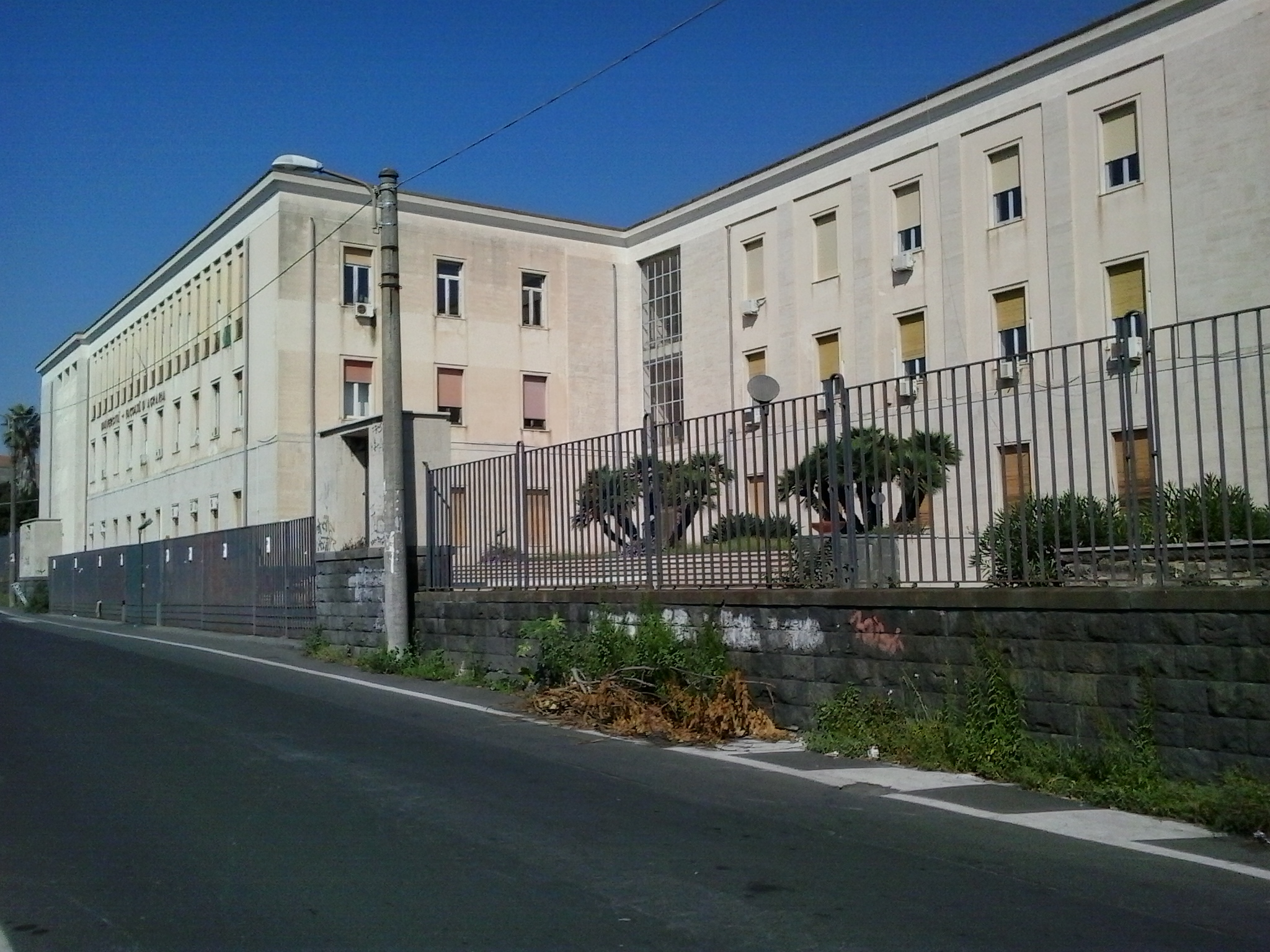 Sede del Dipartimento di Agricoltura (ex Facoltà di Agraria) dell' Università degli Studi di Catania, nel quartiere Cibali